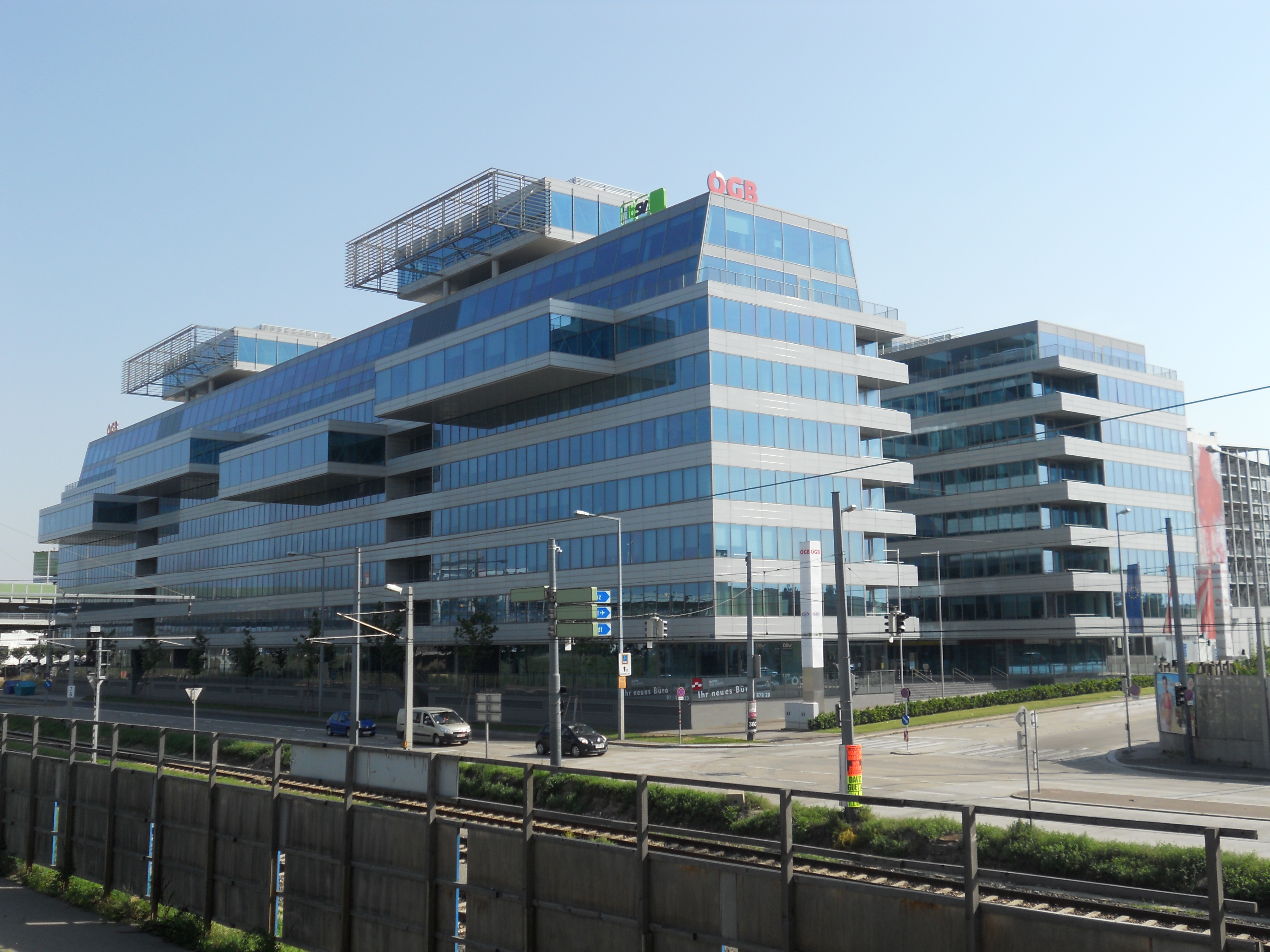 Das Hauptgebäude des Österreichsichen Gewerkschaftsbundes am Johann-Böhm-Platz 1